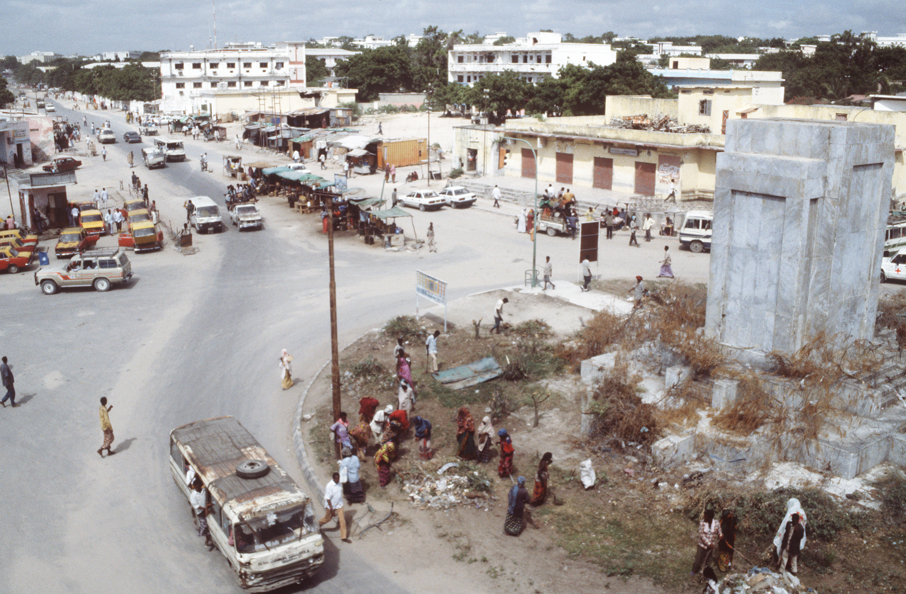 A view of the K-4 Circle outside of the Bangladesh Army compound in Mogadishu. Somalis work around and within the compound in exchange for food in a work-for-food program set up by the Bangladeshis.